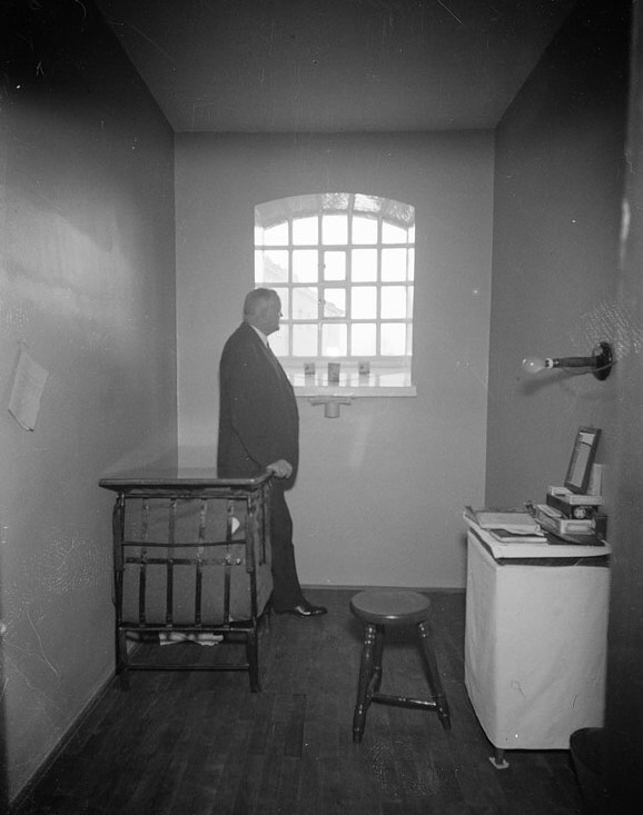 Direktör Sven Axi i en fängelsecell på Långholmen i Stockholm